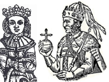 Anna Cylejska wth Jogaiła